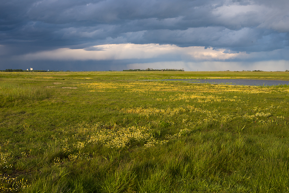 Hutweide am Nordufer der Langen Lacke, Nationalpark Neusiedler See-Seewinkel This file shows the National Park Neusiedler See-Seewinkel in Austria.